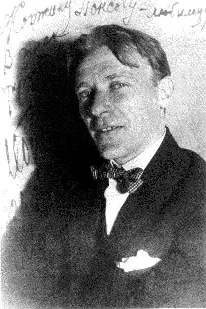 Булгаков, Михаил Афанасьевич